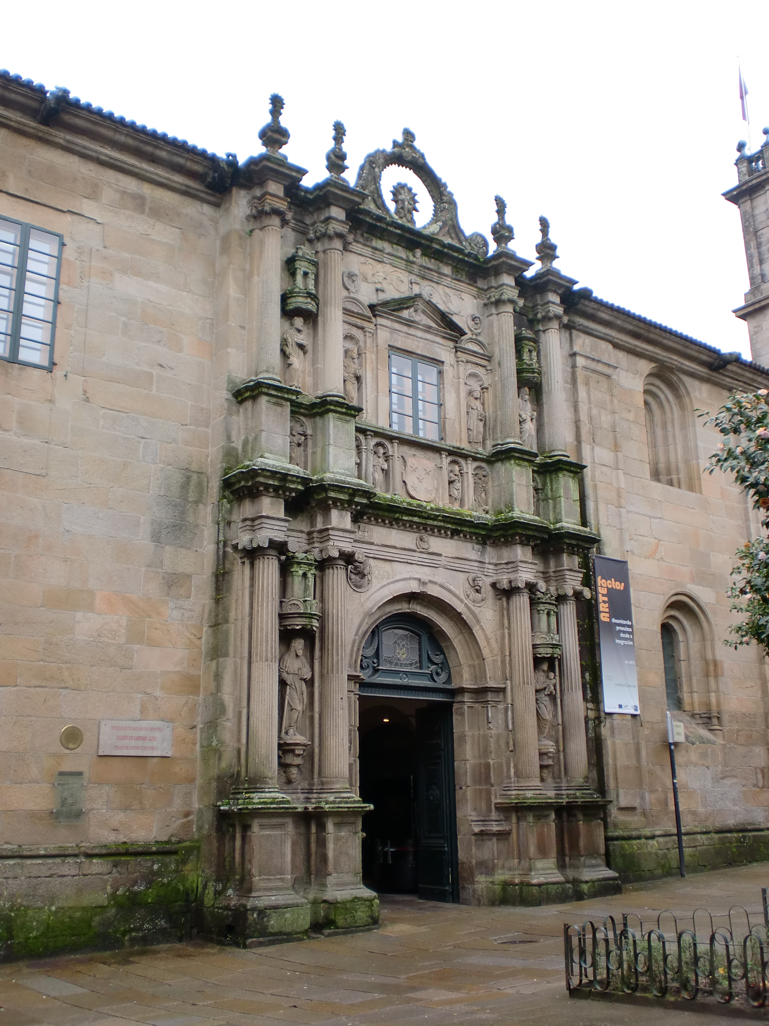 Colexio de Fonseca